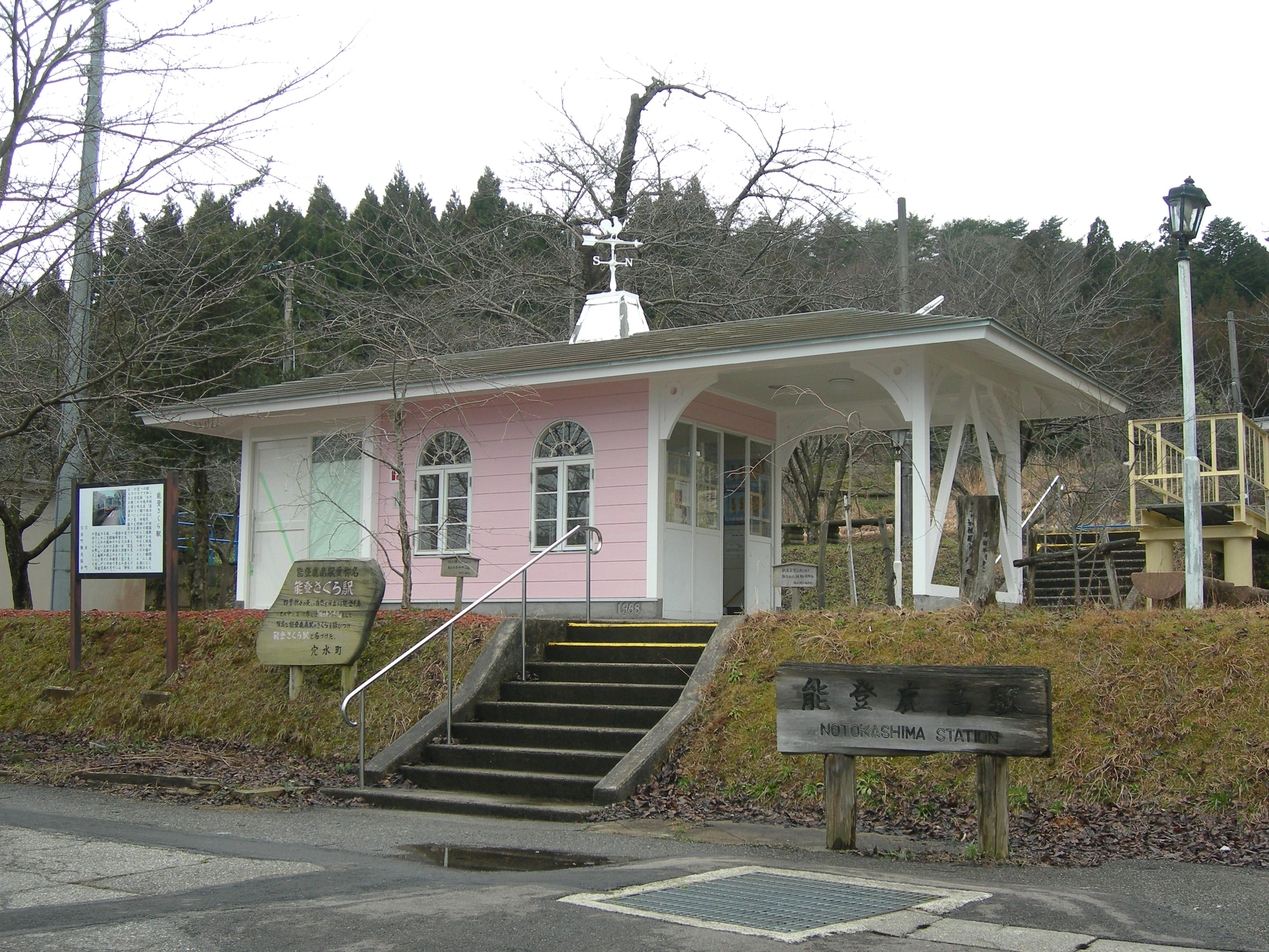 のと鉄道 能登鹿島駅